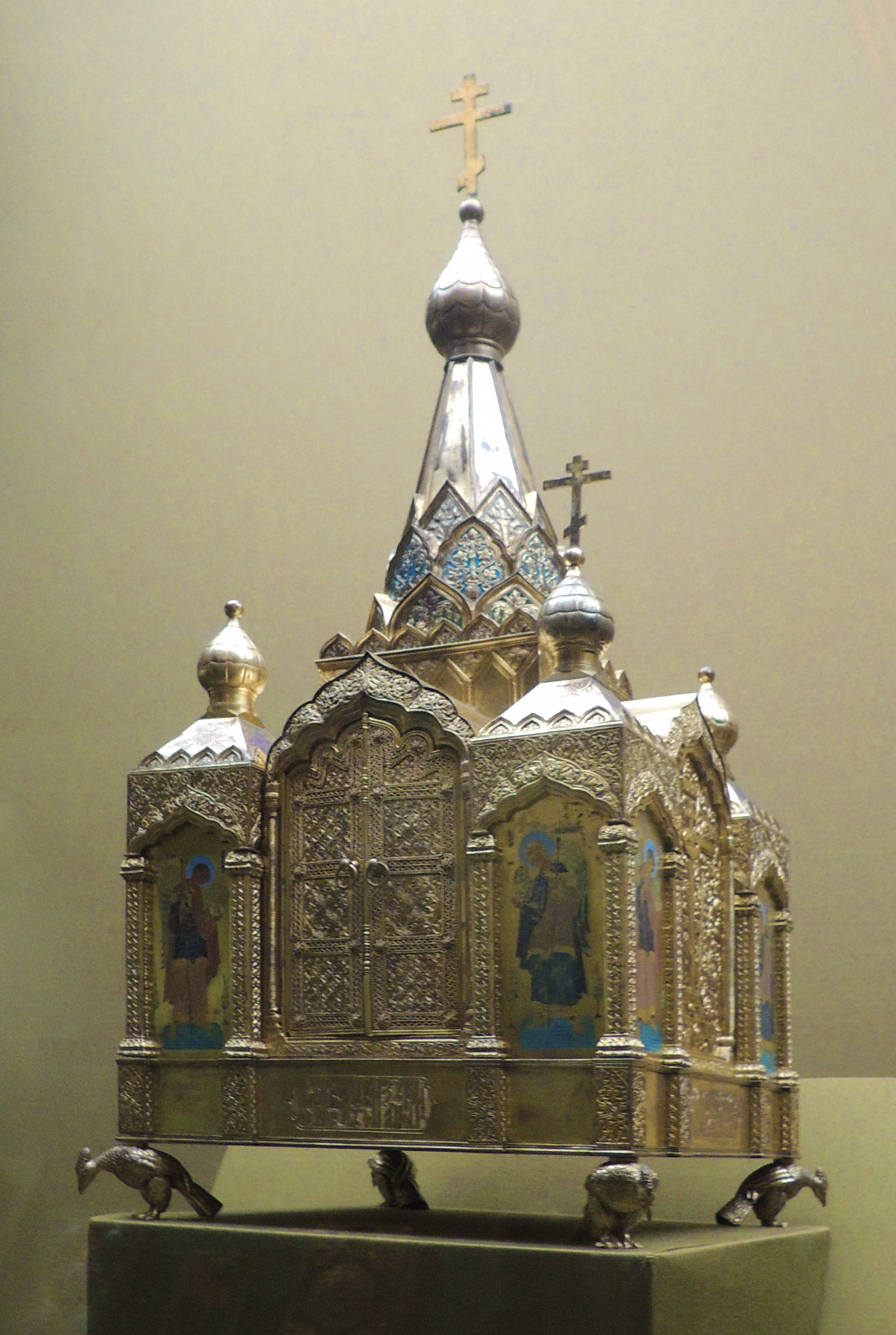 Дарохранительница. 1912. Мастер Ф.Я. Мишуков. Москва. Серебро, чеканка, гравировка, скань, чернь, золочение, выемчатая эмаль. ГТГ